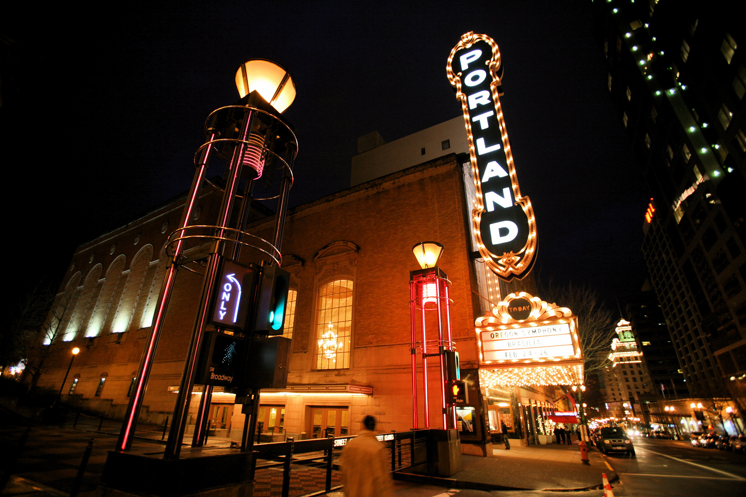 The Arlene Schnitzer Concert Hall in Portland, Oregon